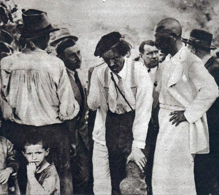 La pénible arrivée du Professeur Auguste Picard à Monzambano, le 17 août 1932, après son 2e vol stratosphérique.